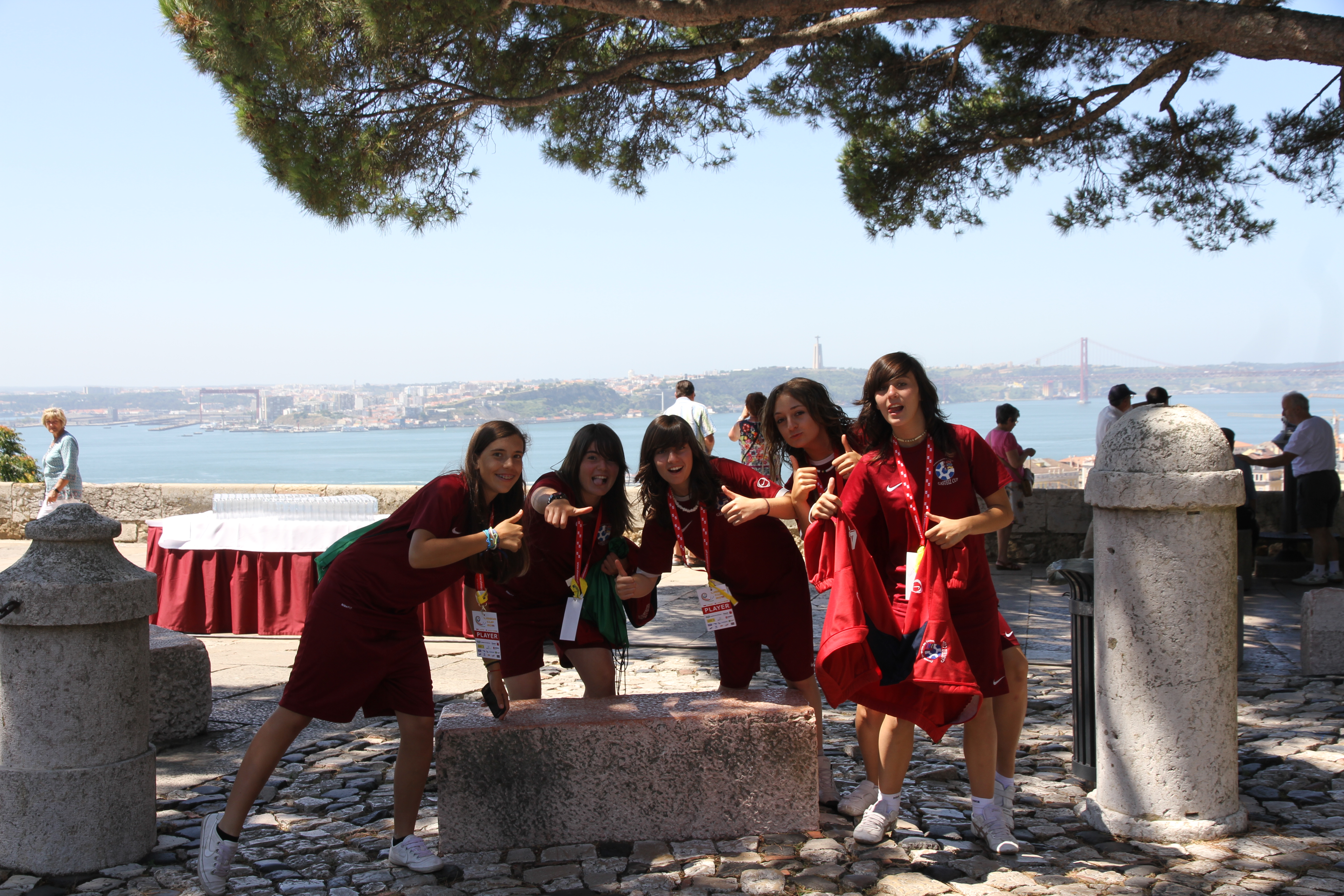 6.26.2011 - 7.3.2011 Lisbon travel